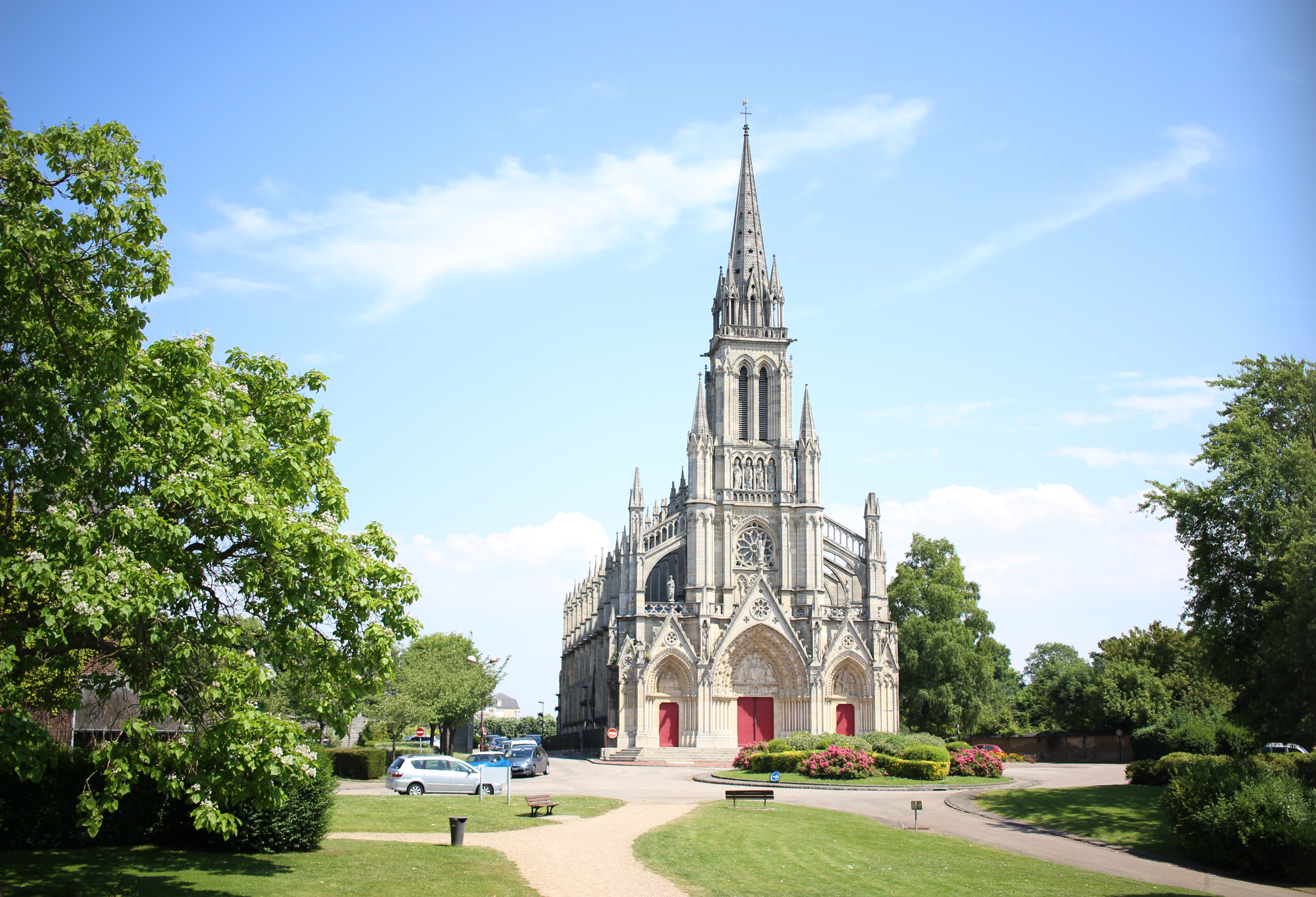 La Basilique de Bonsecours, façade occidentale.